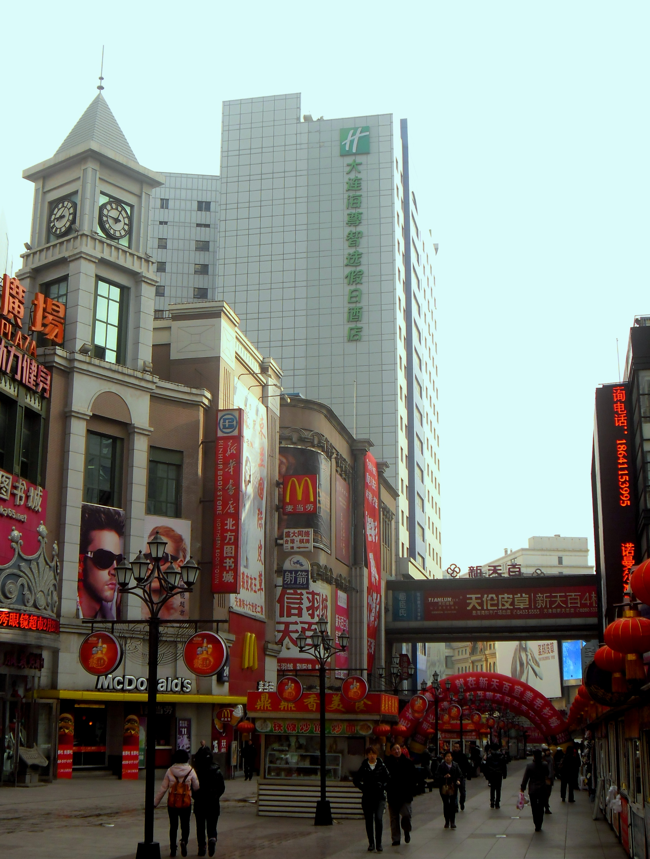 中文（中国大陆）: 辽宁省大连市